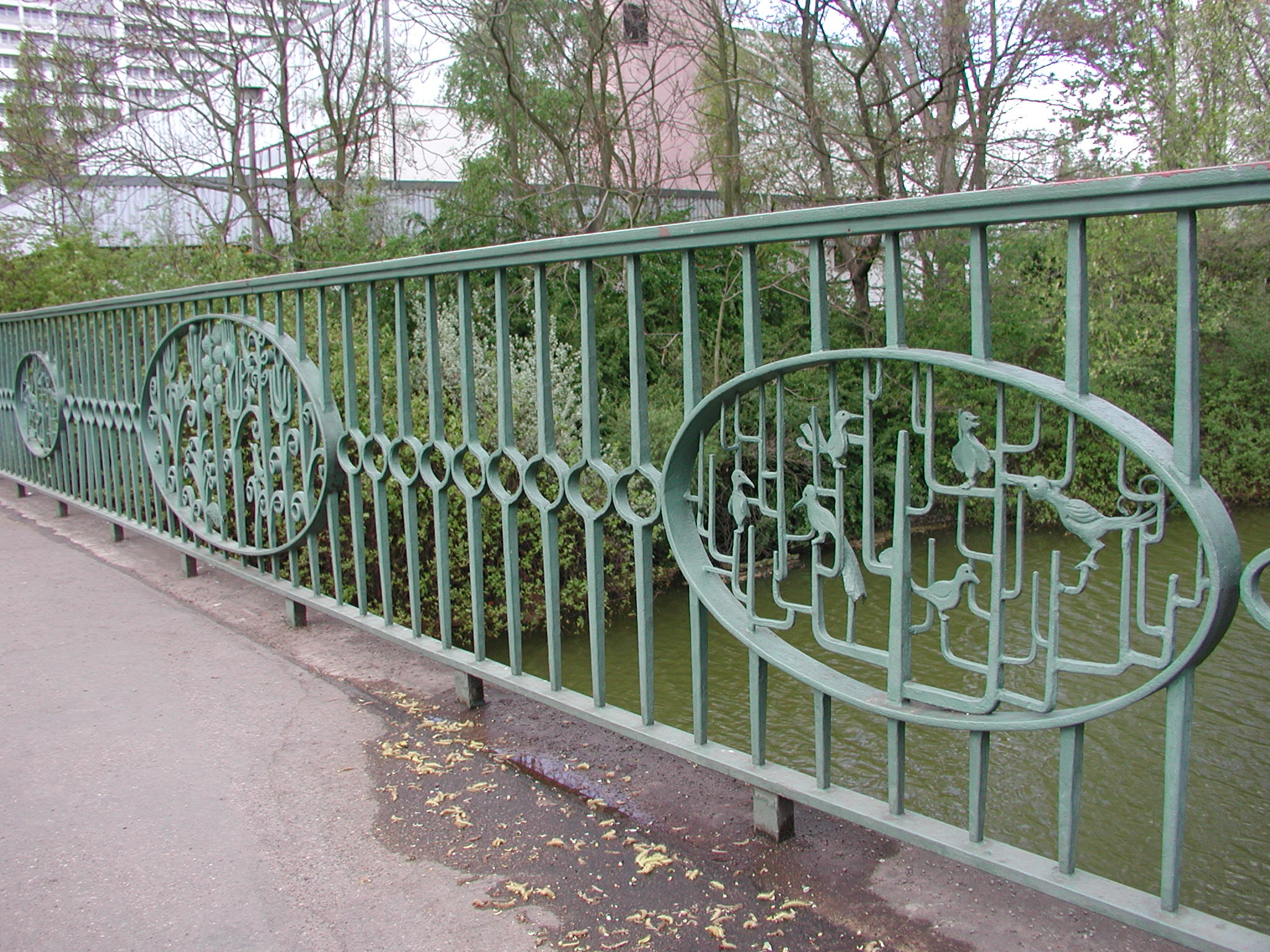 Geländer an der Fußgängerbrücke über den erweiterten Fennpfuhl